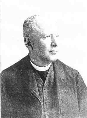 Msgre. Josef Hessoun